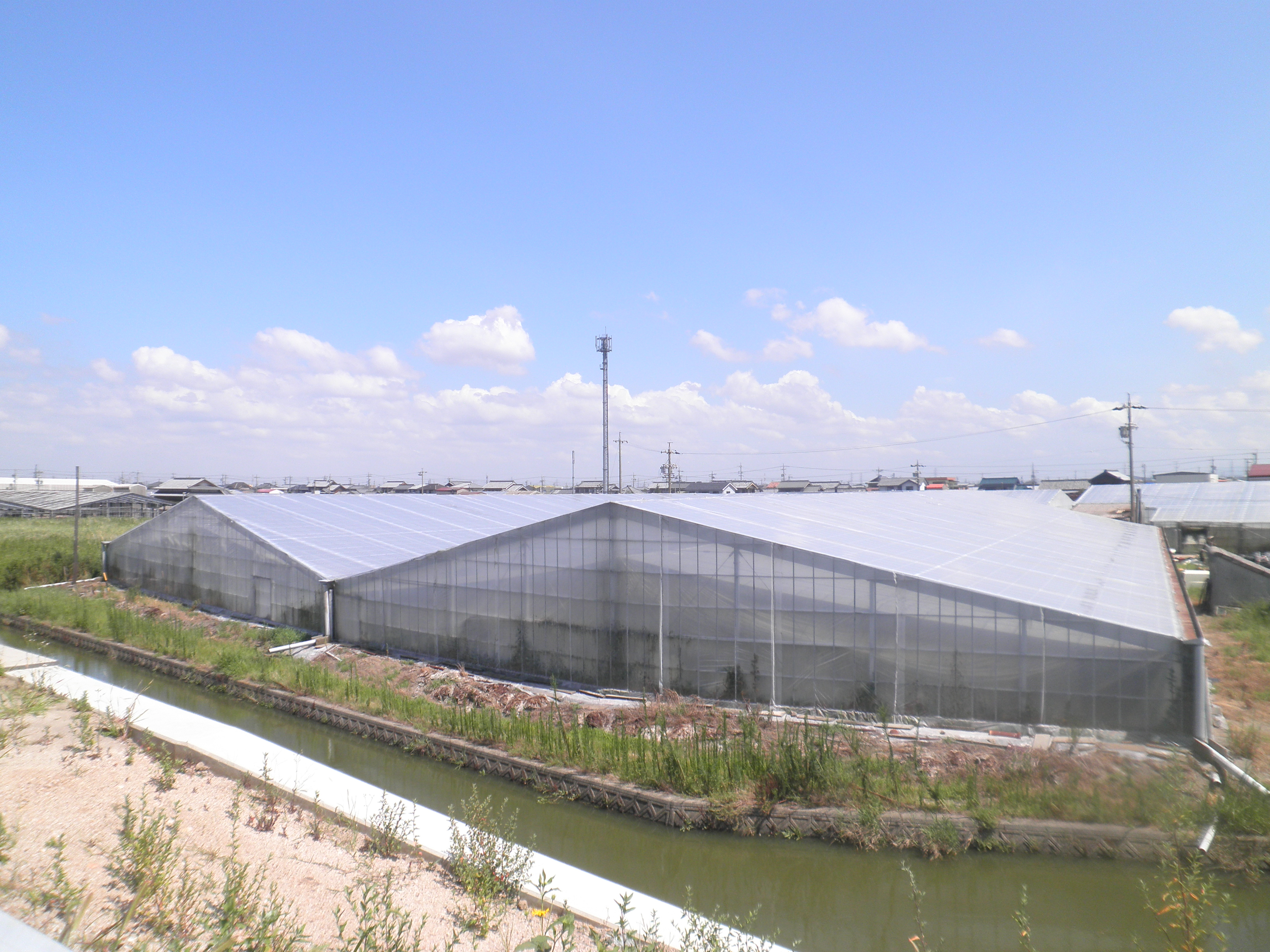 愛知県西尾市一色町にある養鰻用のビニールハウス